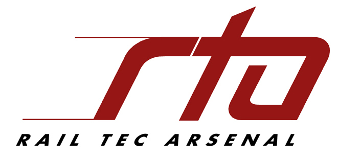 Logo der Firma RTA